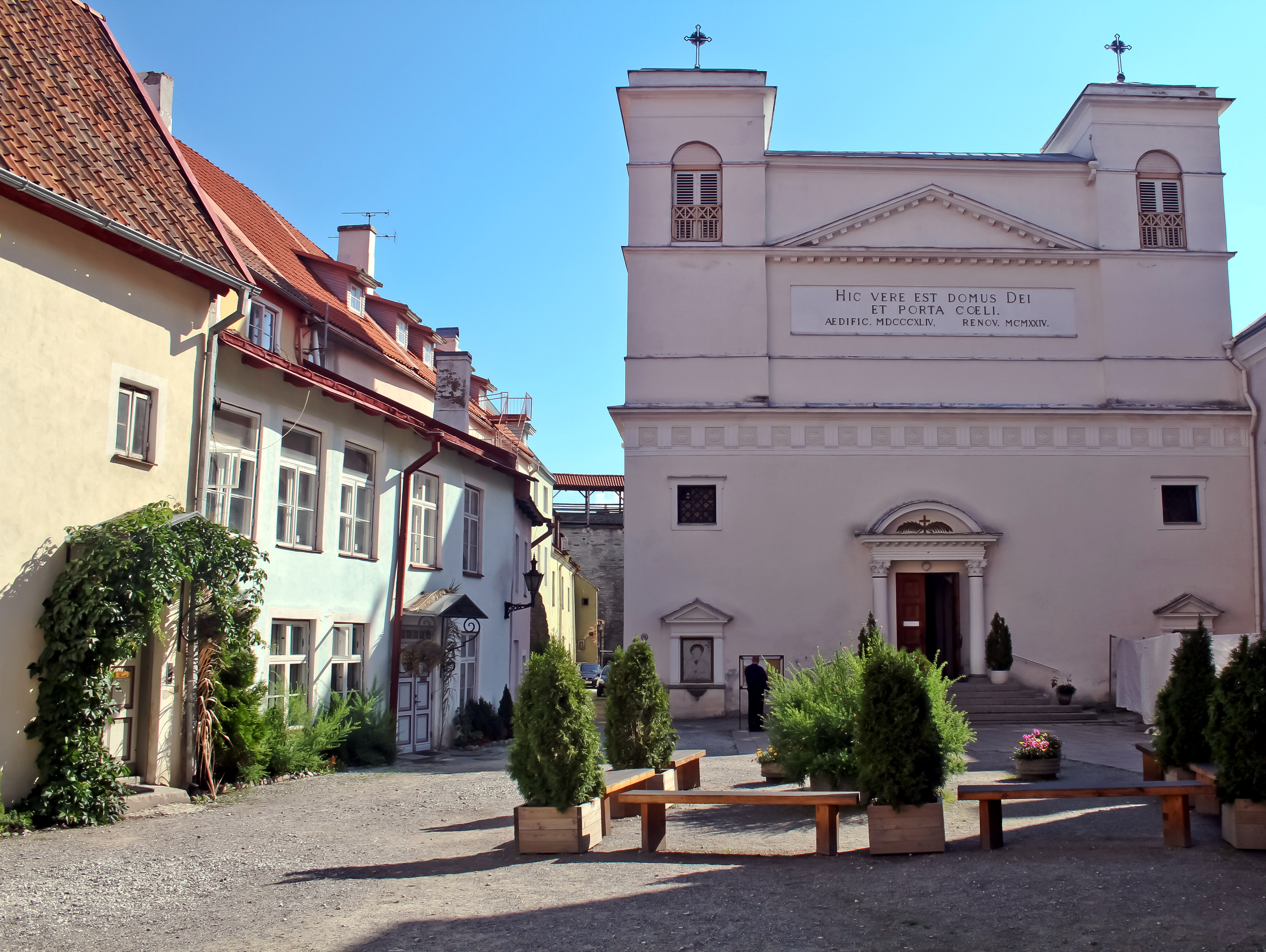 Reval